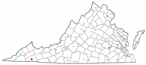 va maps